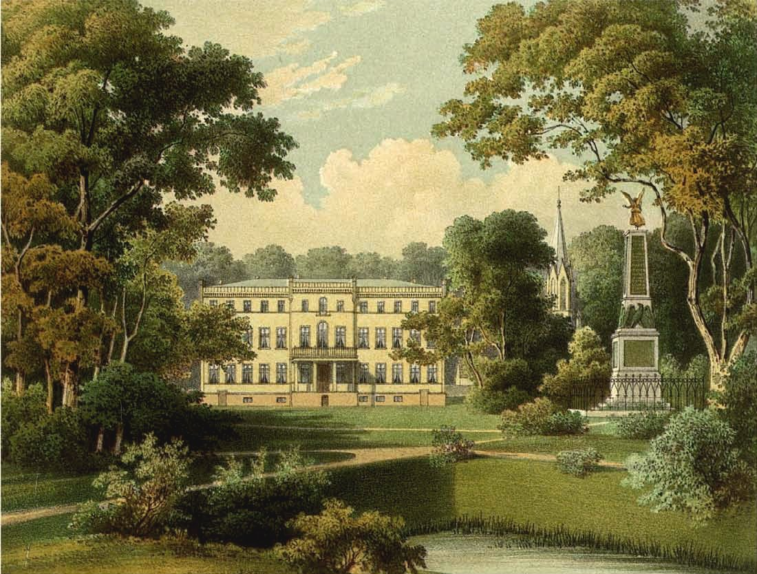 Schloss Tamsel, Kreis Landsberg, Provinz Brandenburg, bei Küstrin, Lithographie von Alexander Duncker